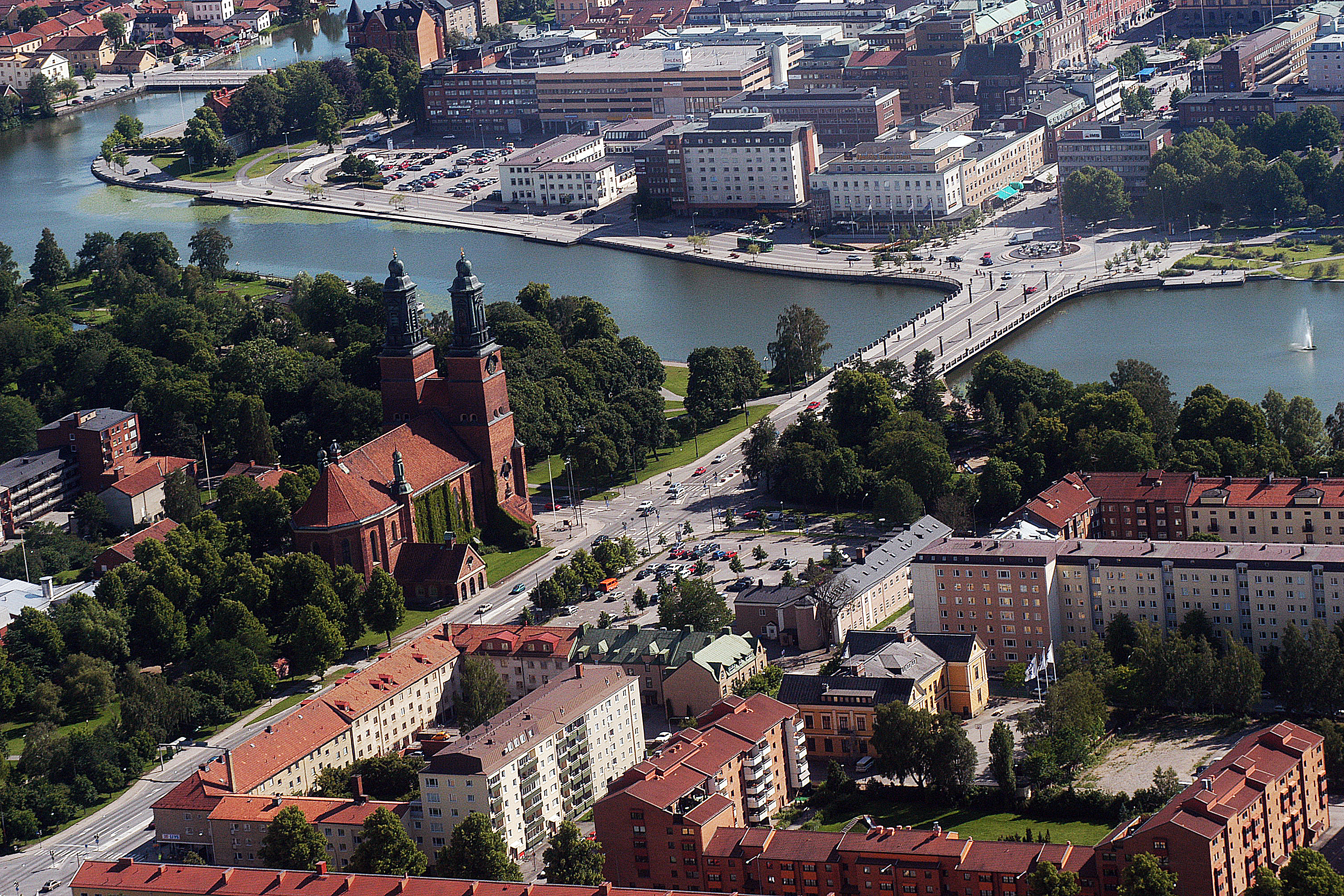 Flygfoto över Eskilstuna 2004